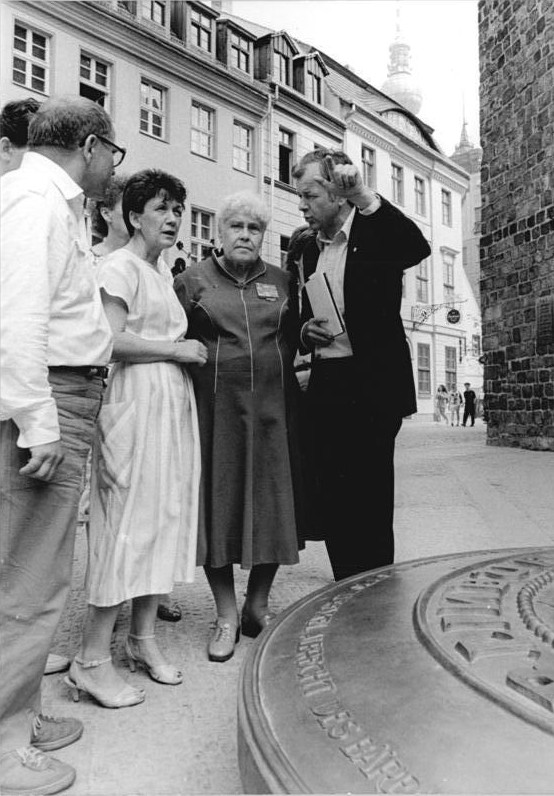 ADN-ZB Senft 29.6.87 Berlin: Jubiläum. Gast der DDR-Hauptstadt anläßlich des 750jährigen Jubiläums ist Anna Wladimirowna Nikulina (2.v.r.), die als Kommandeur einer Stoßgruppe am Sturm auf die Berliner Reichskanzlei teilnahm und in der Nacht vom 1. zum 2. Mai 1954 die Siegesfahne auf dem Führungszentrum des nazireiches hißte. Die 82jährige Moskauerin besuchte bereits mehrfach die DDR. Der Leiter des Stadtarchivs Berlin, Oberarchivrat Dr. Werner Gahrig (r.), begleitete den Gast durch das historische Stadtzentrum (hier vor der Nikolaikirche).